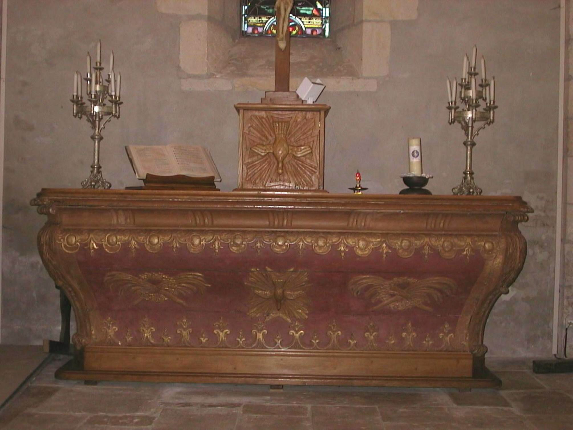 Sauvigny-les-Bois (Nièvre, France), église Saint-Étienne, le maître-autel de type "tombeau".